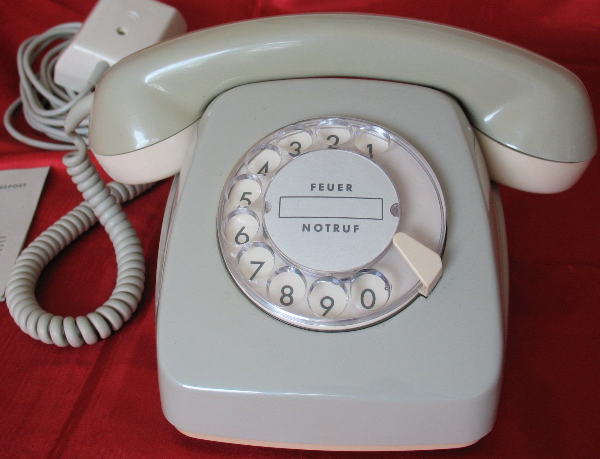 Fernsprechtischapparat FeTAp 611-2 der deutschen Bundespost von 1983